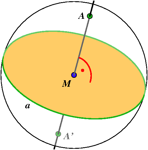 Dualitaet von Punkt und Gerade auf der Kugel